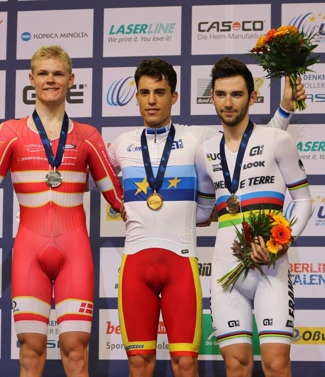 Podium Omnium, v.l.n.r.: Julius Johansen, Albert Torres, Benjamin Thomas